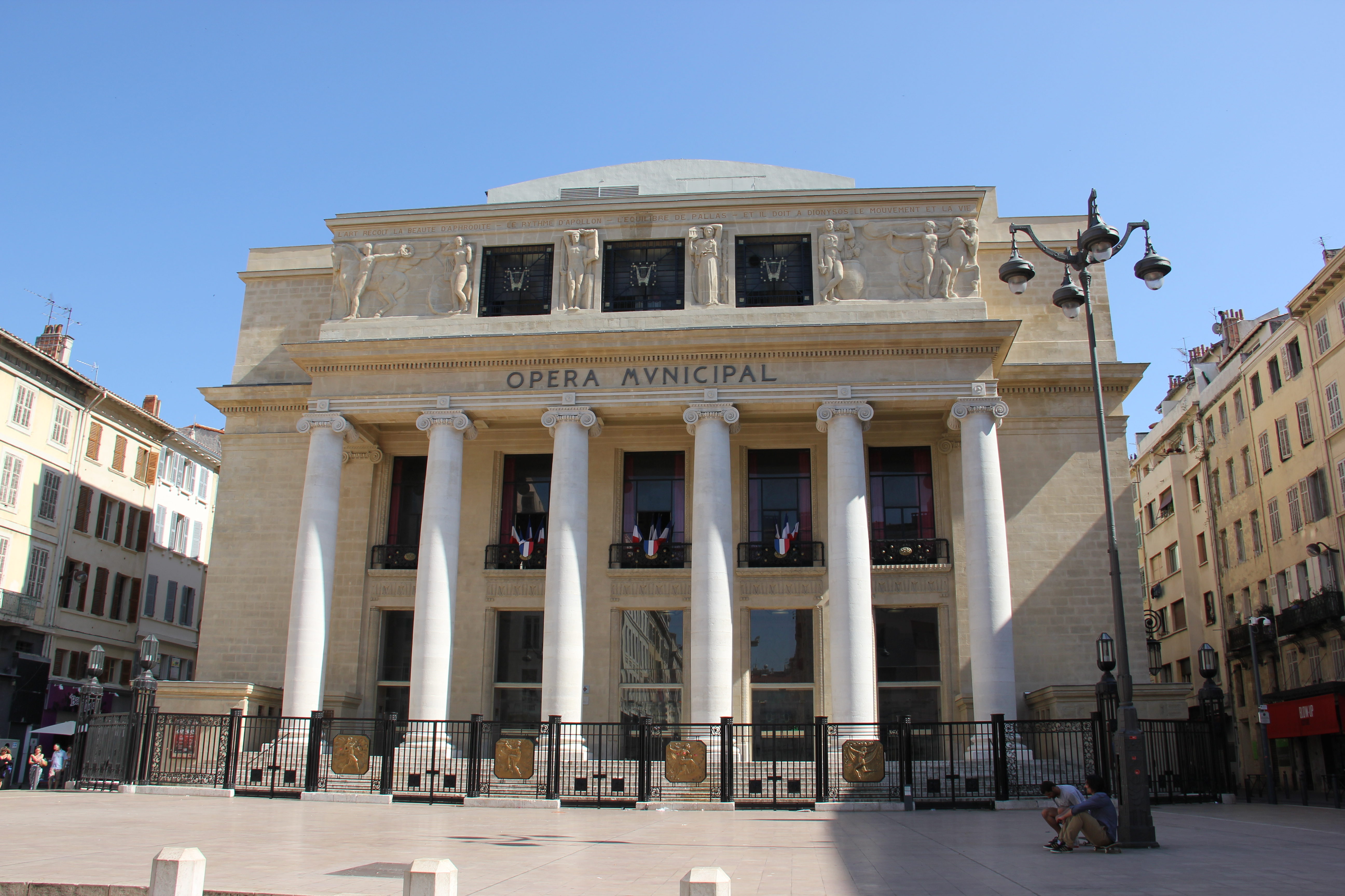 Marseille